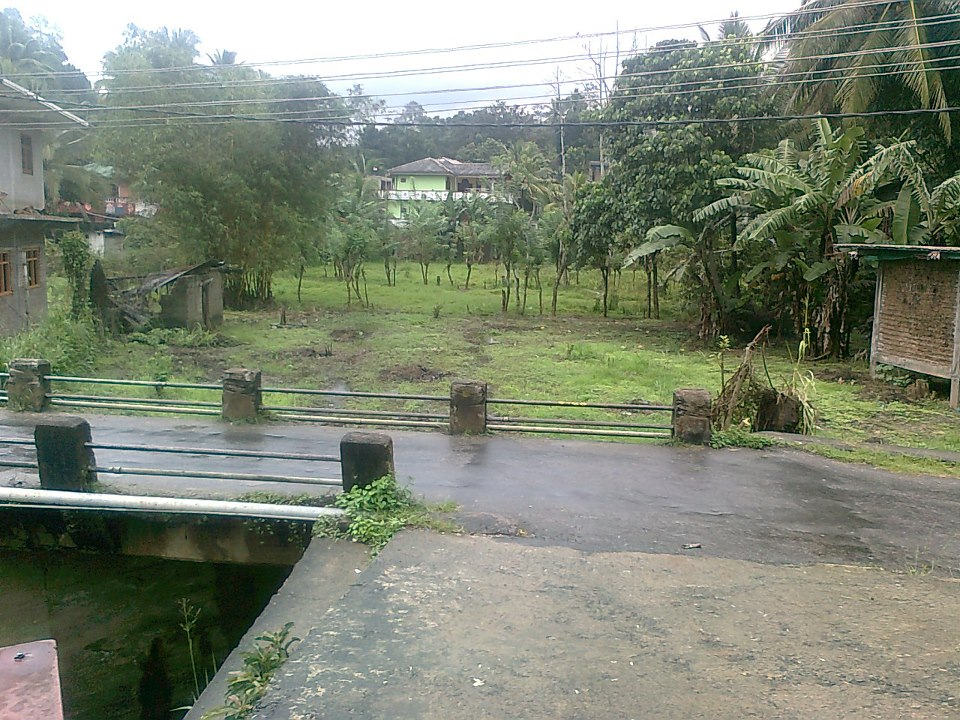 உடதலவின்ன இலங்கையின் மத்திய மாகாணத்திலுள்ள கண்டி மாவட்டத்தில் அமைந்துள்ள ஒரு நகரமாகும்.